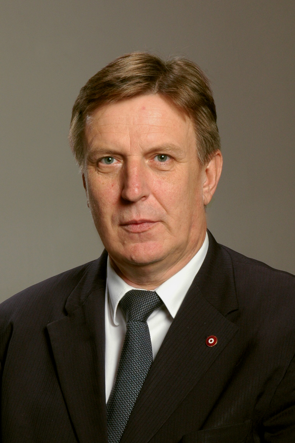 10.Saeimas deputāts Māris Kučinskis